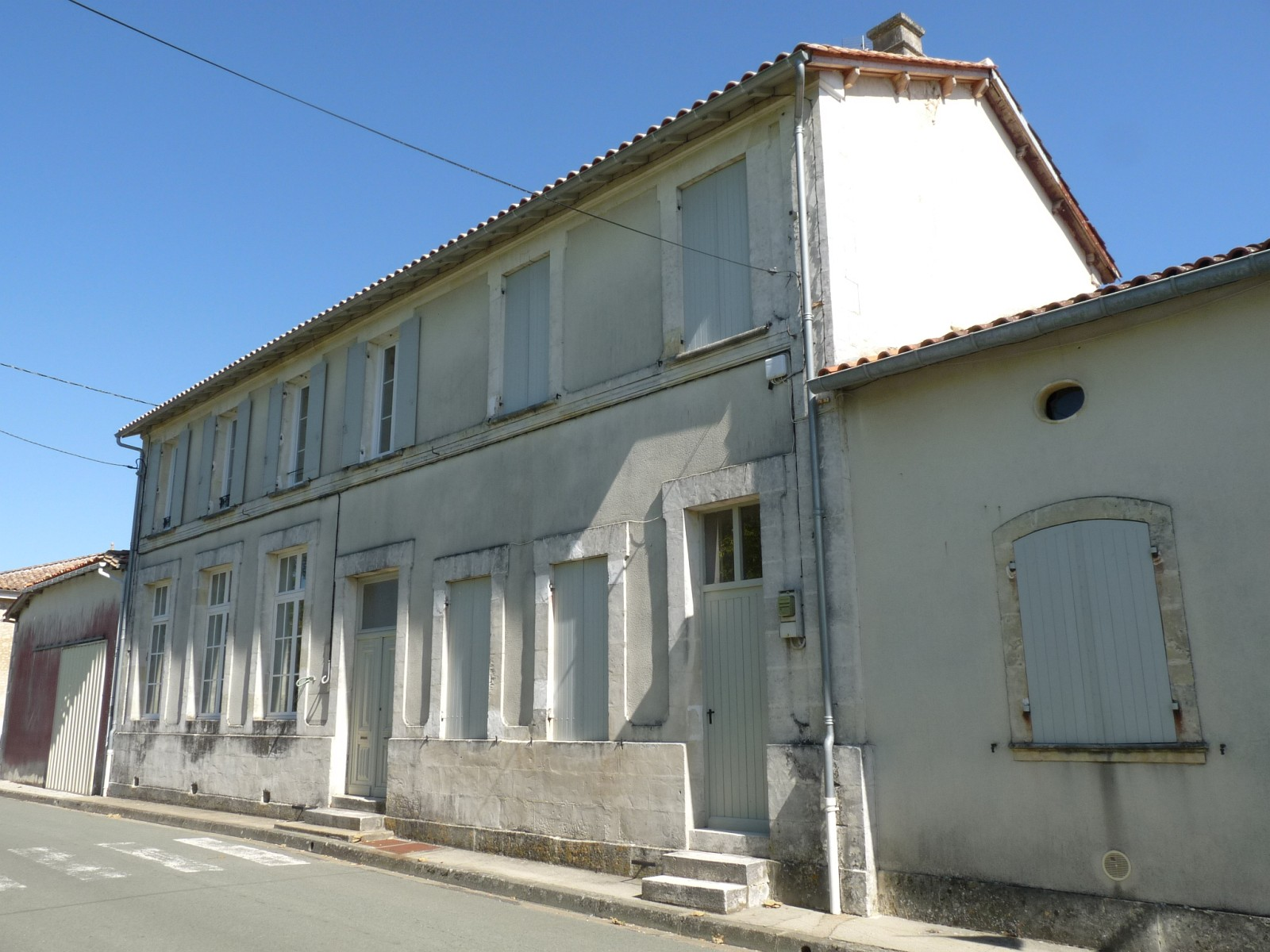 Ancienne mairie-école de Mortiers, Charente-Maritime, France